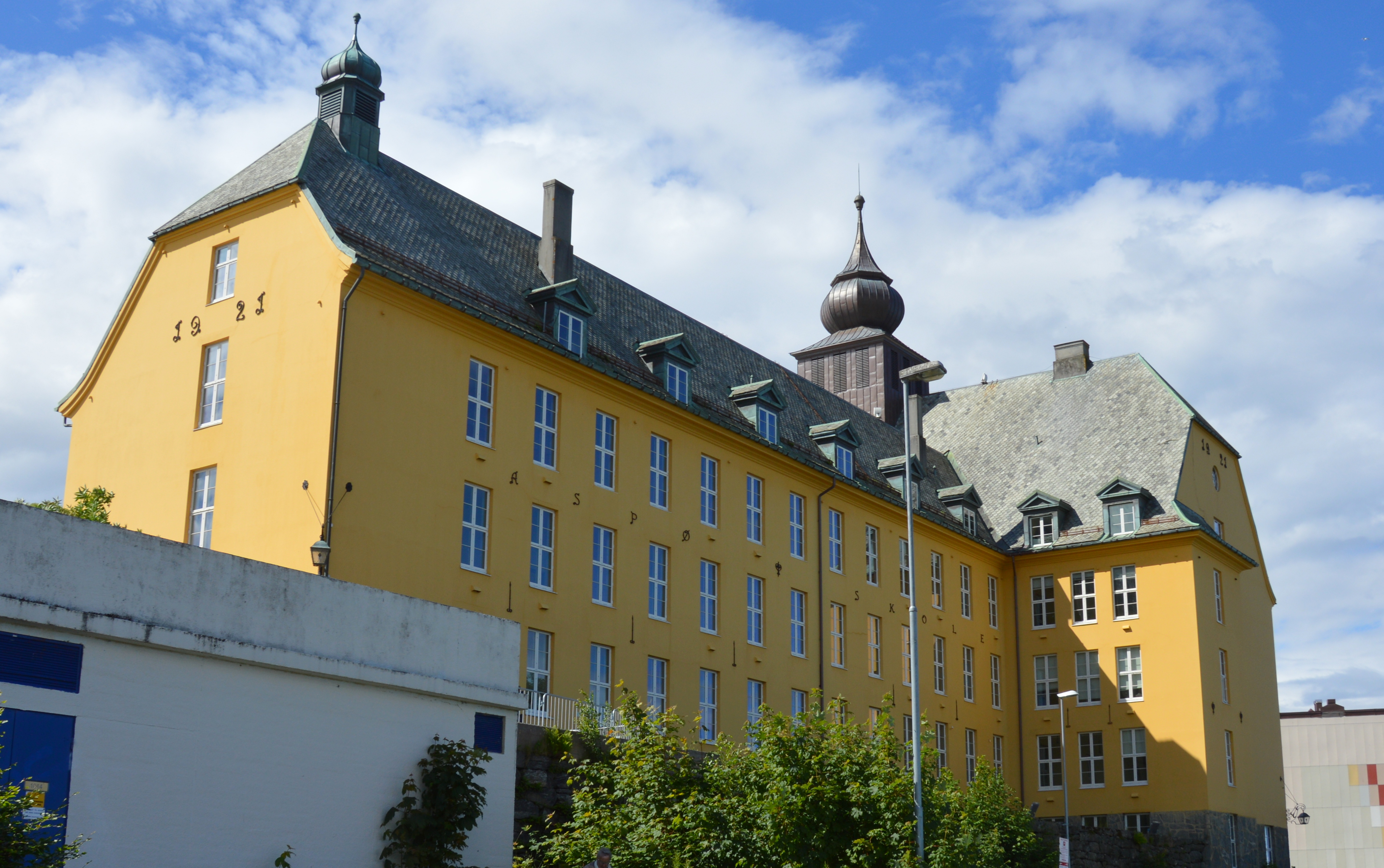 Aspoy-Schule